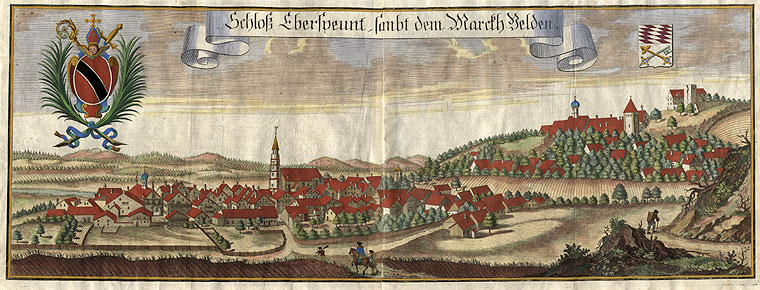 Michael Wening (1645-1718): Schloß Eberspeunt sanbt dem Marckh Velden (Schloss Eberspoint mit dem Markt Velden) Kolorierter Stich aus Historico-topographica Descriptio. Verlegt bei Johann Lucas Straub, München 1701-26.